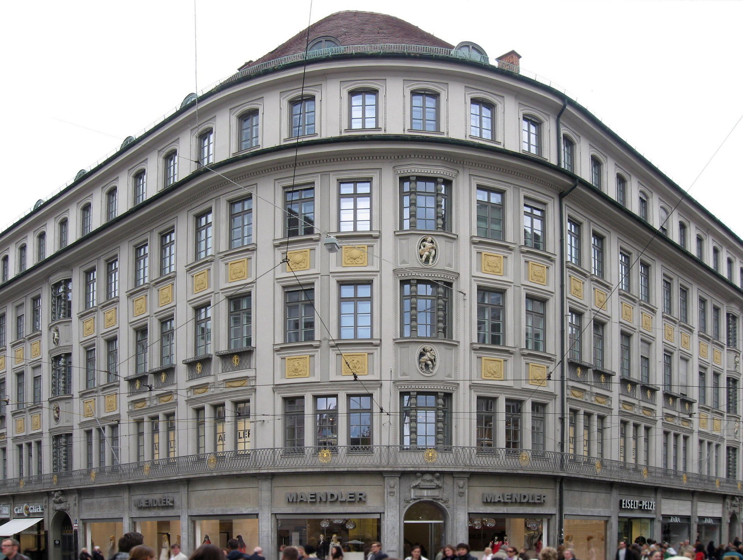 Theatinerstraße 7; Sog. Arco-Palais, Geschäftshaus im barockisierenden Jugendstil, mit abgerundeter Ecke, 1910 von Georg Meister und Oswald E. Bieber; zugehörig Maffeistraße 4.